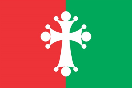 ოზურგეთის მუნიციპალიტეტის დროშა